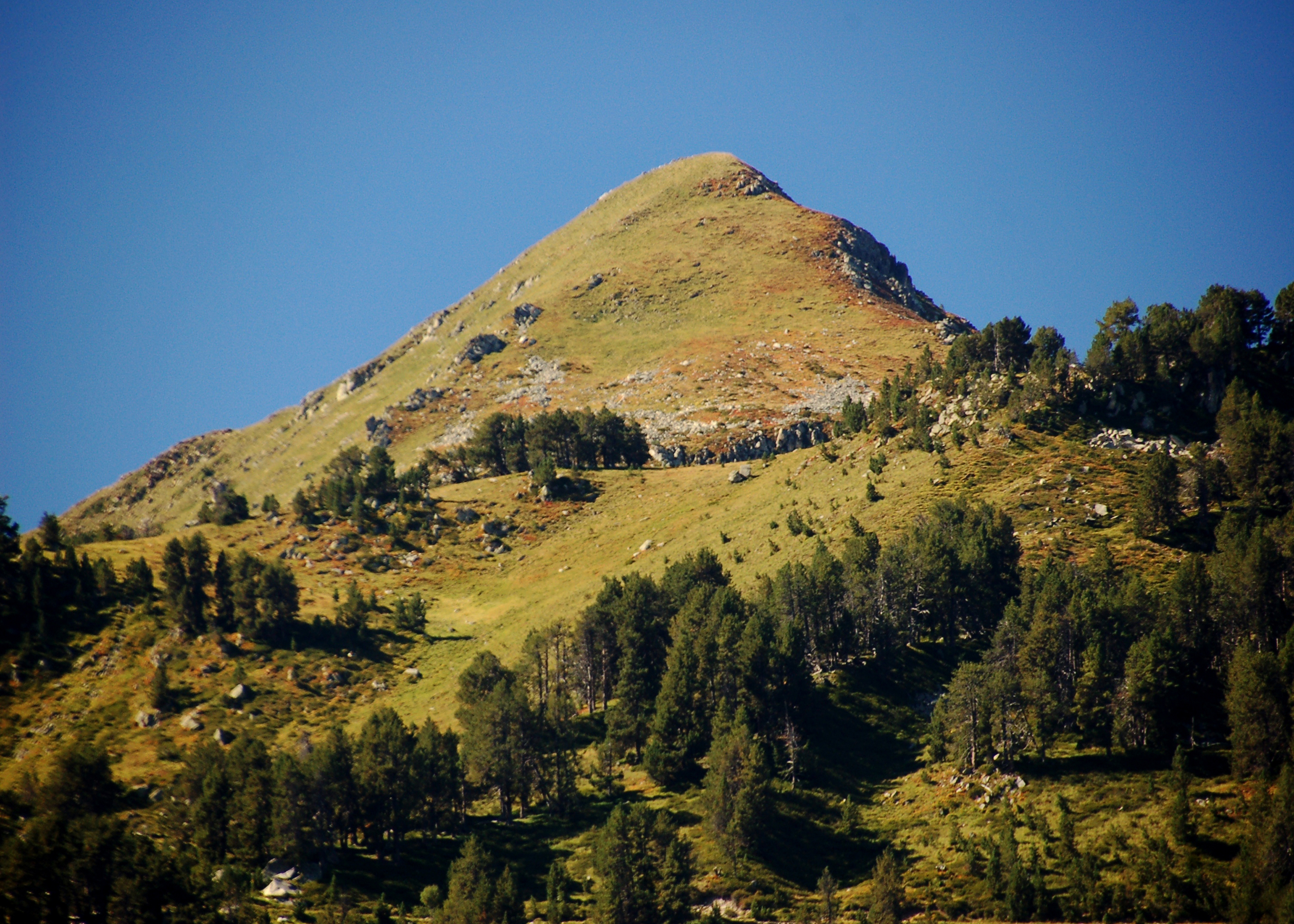 Tuc de Salana, amb una alçada de 2480 m té una magnifica visió de les regions lacustres de Saboredo i Colomers a la Vall d´Aran This is a a photo of a natural area in Catalonia, Spain, with id: ES510146